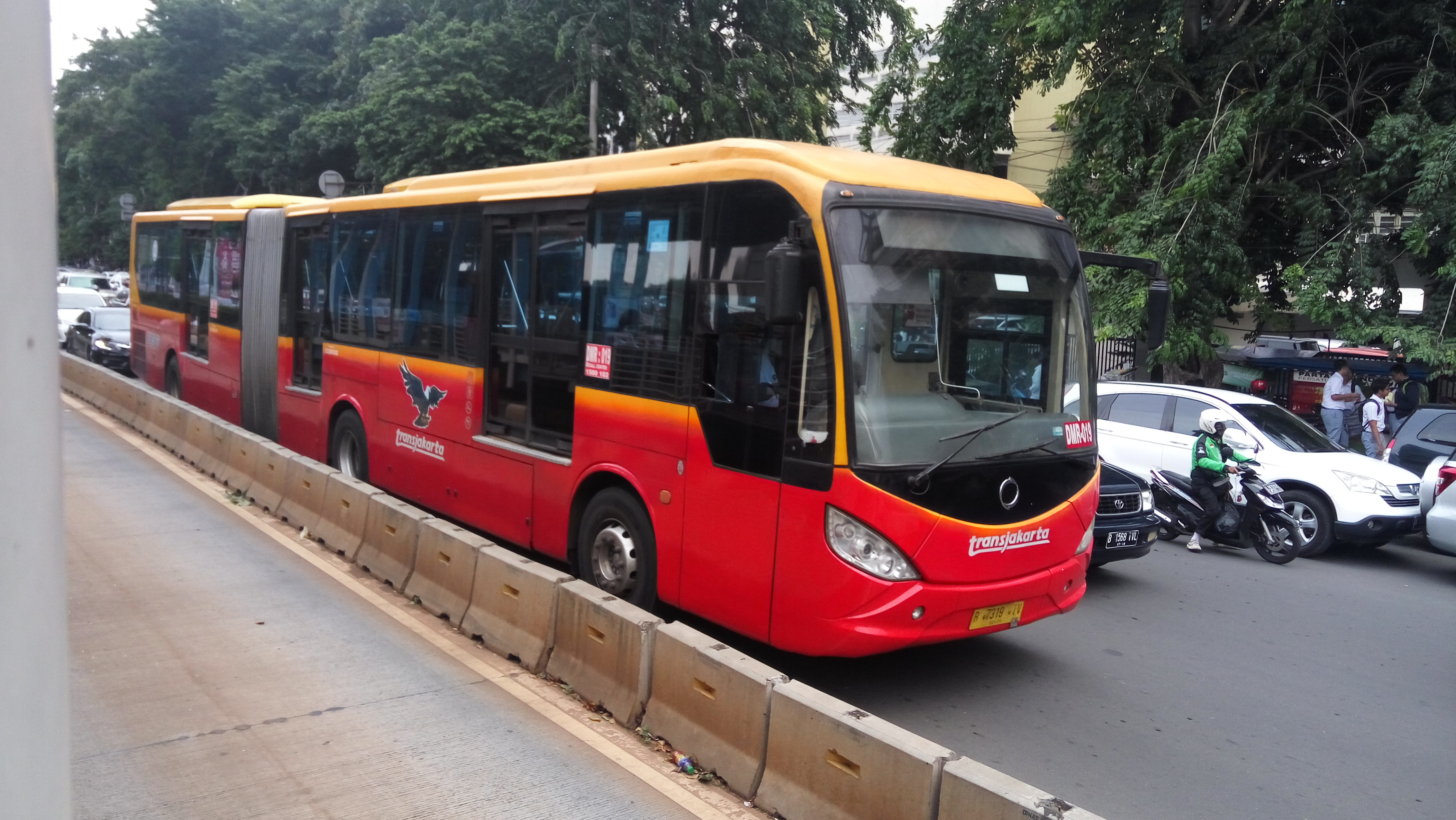 Bus Inobus buatan PT INKA milik Perum DAMRI